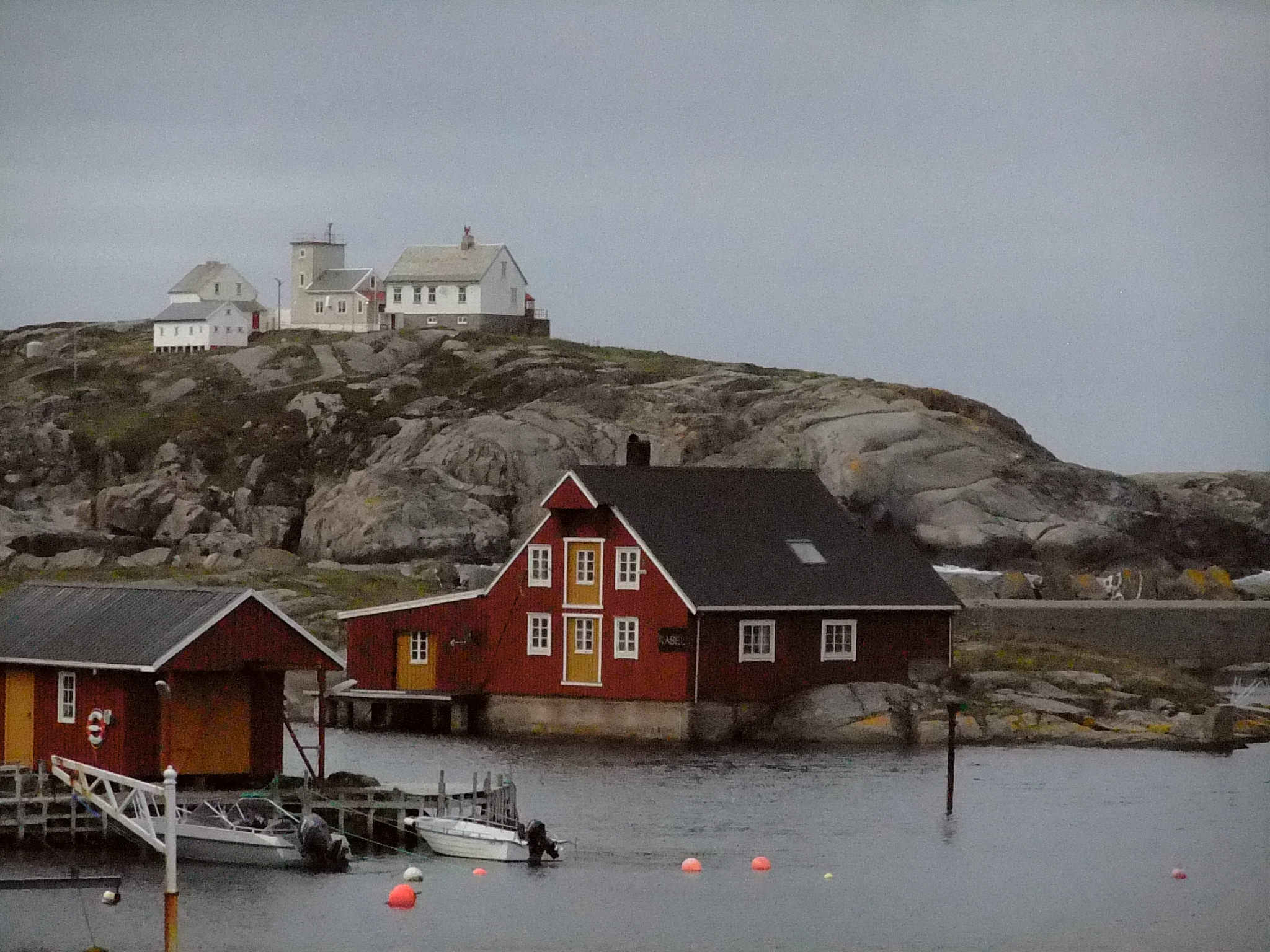 Bjørnsund, Møre og Romsdal